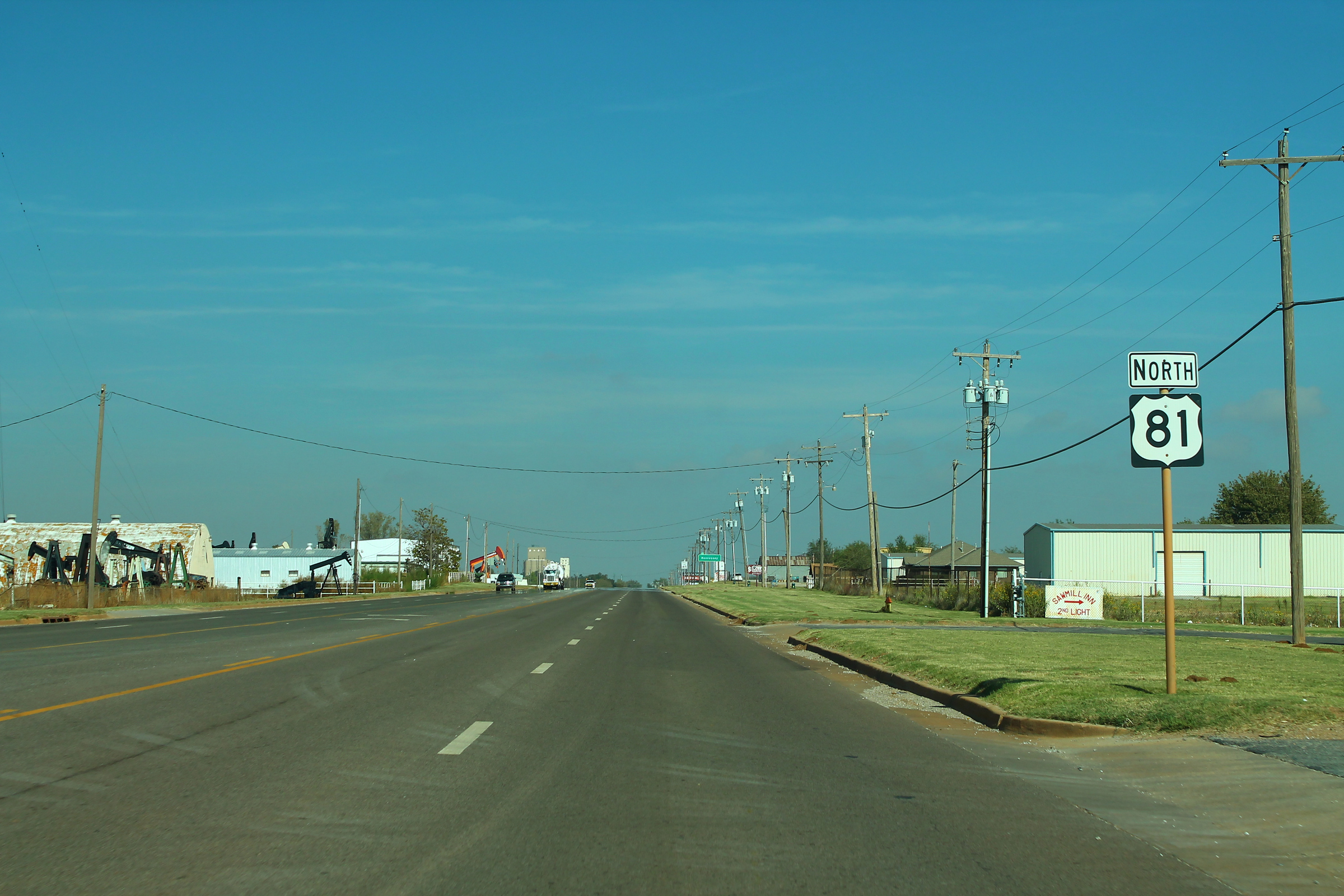 US81nRoad-HennesseyOK